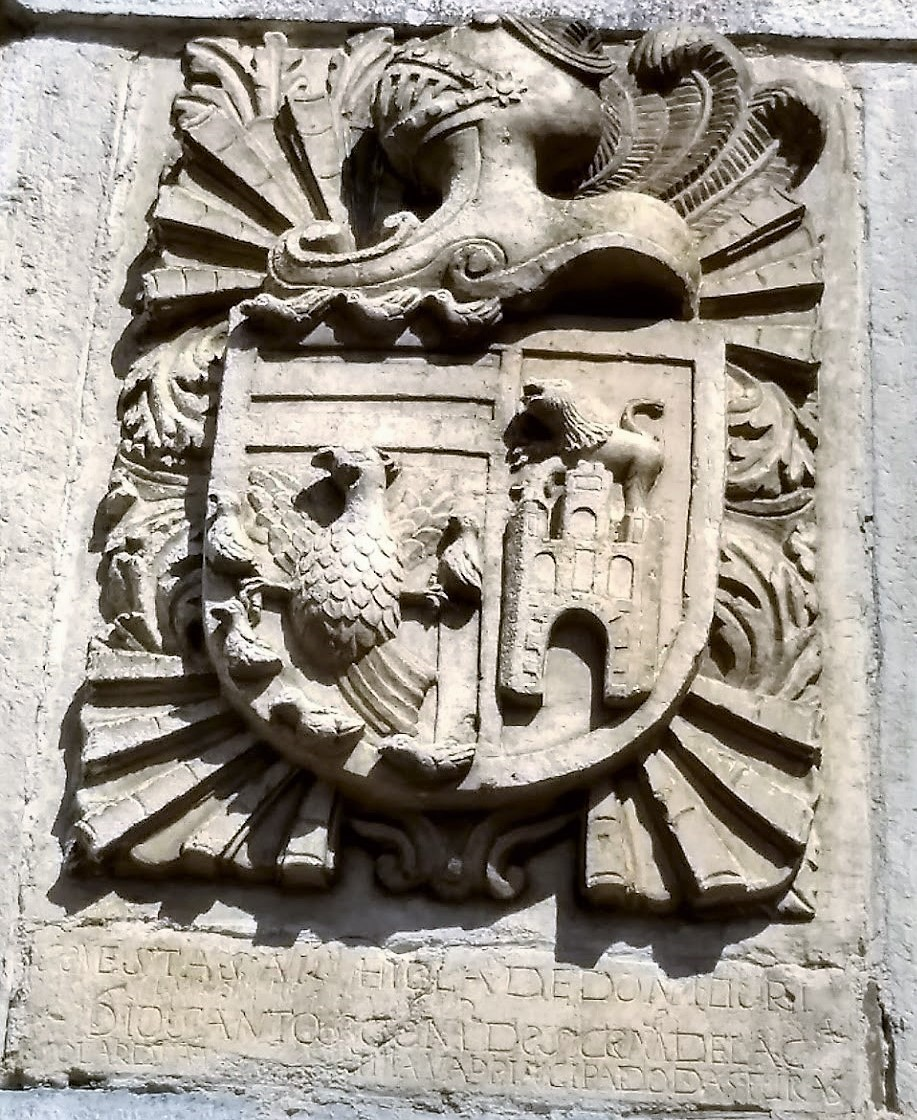 Escudo en vivienda de Cofiñal